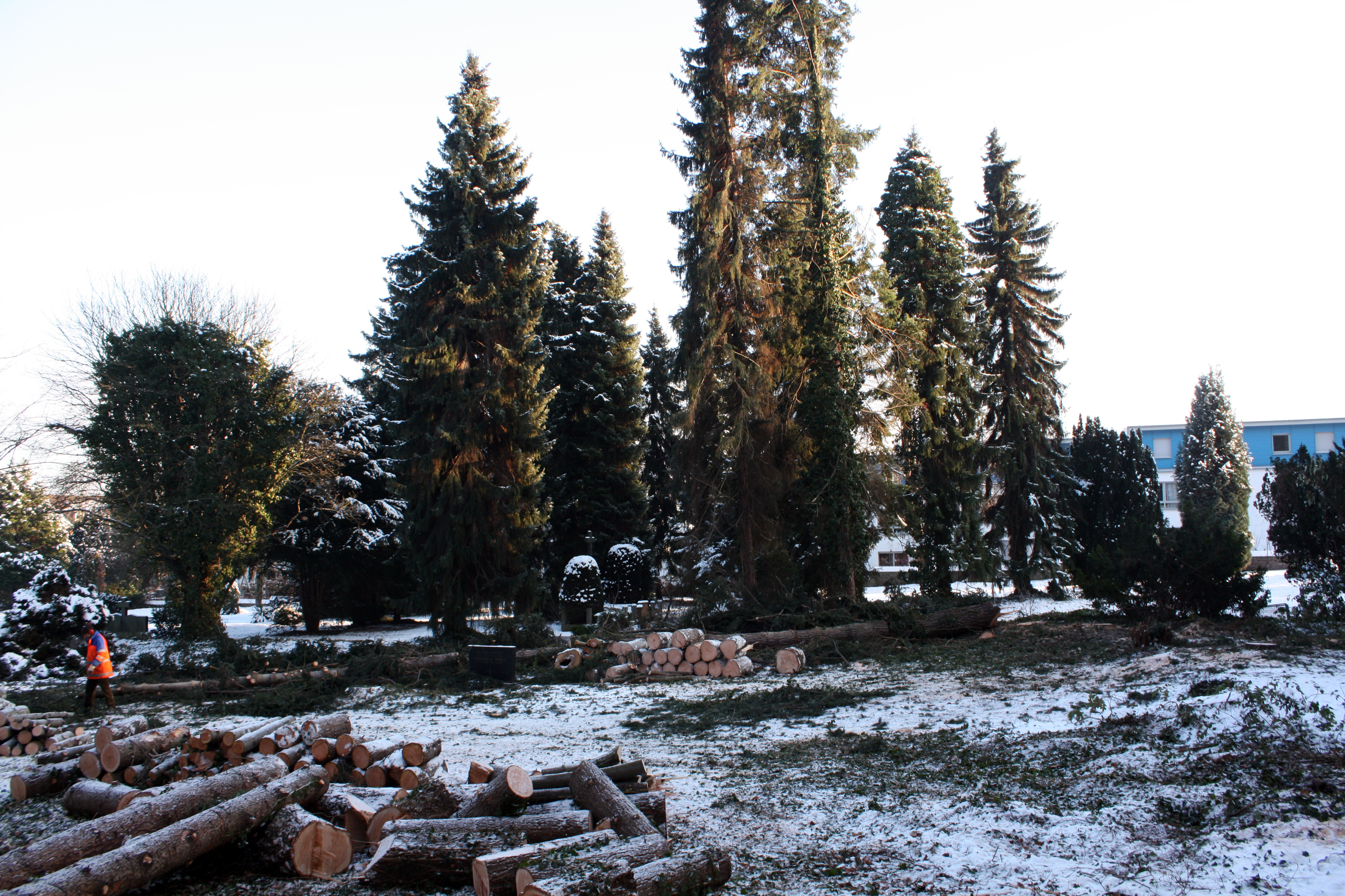 Hürth-Hermülheim, Friedhofsumgestaltung in ein Parkgelände